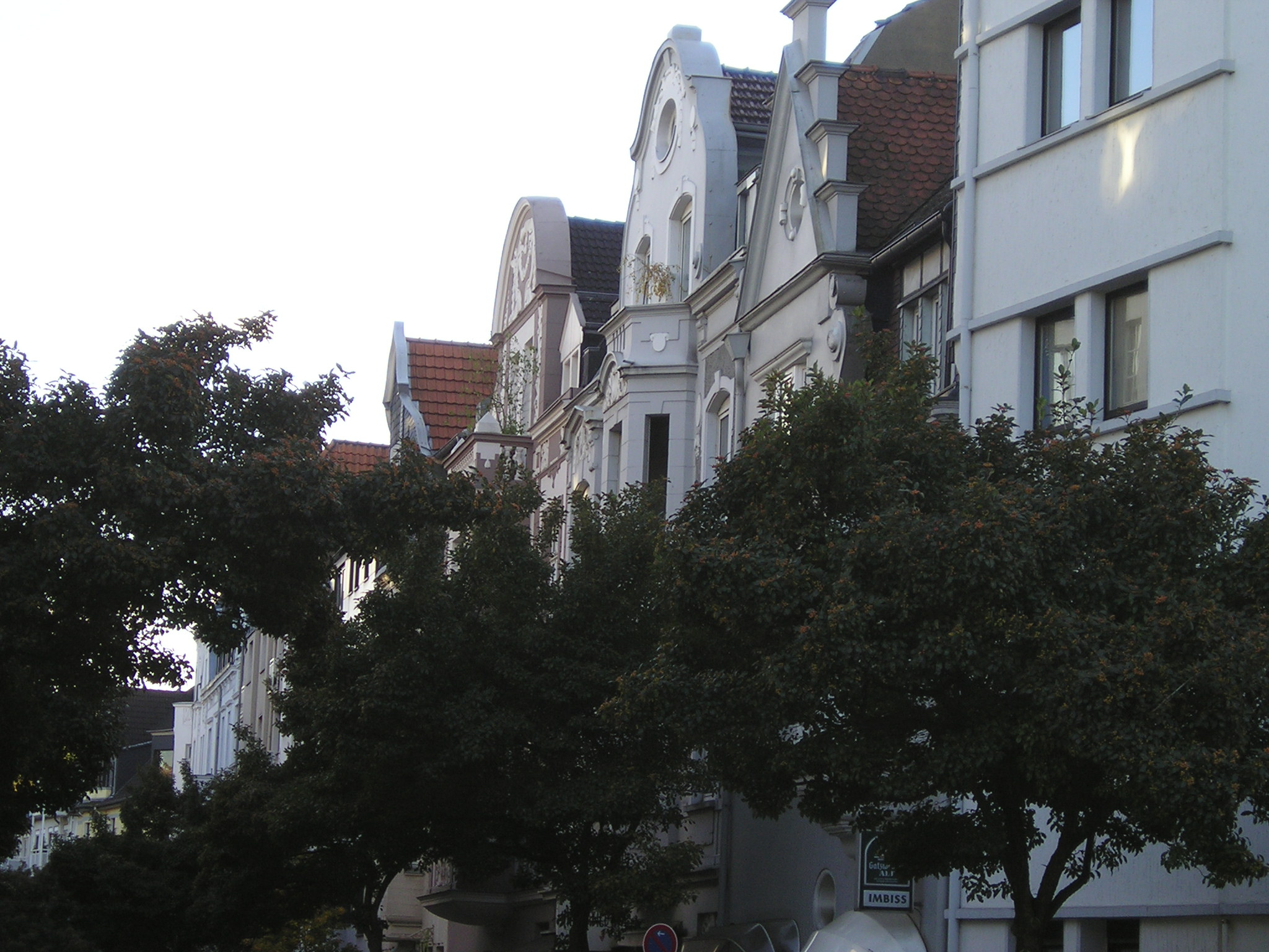 Gründerzeitbauten in Düsseldorf-Benrath, Sophienstraße 2-8